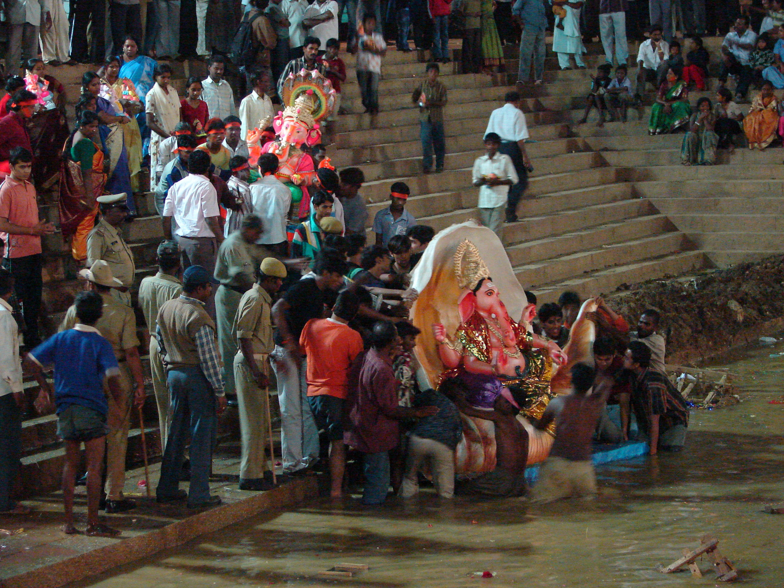 Immersions de Ganesh, près du Sankey Tank, à Bangalore. Auteur: Matthieu Moy